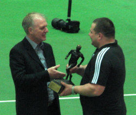 Clemens Prokop übergibt Ralf Bartels den Rudolf-Harbig-Gedächtnispreis bei den Deutschen Leichtathletik-Hallenmeisterschaften 2013